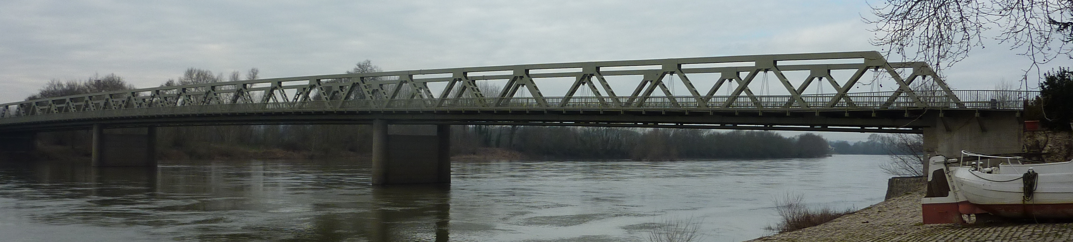 Pont sur le Grand Bras, reliant la commune de Saint-Georges-sur-Loire à l'Île Touchais (Chalonnes-sur-Loire, Maine-et-Loire, France). Vue d'ensemble.